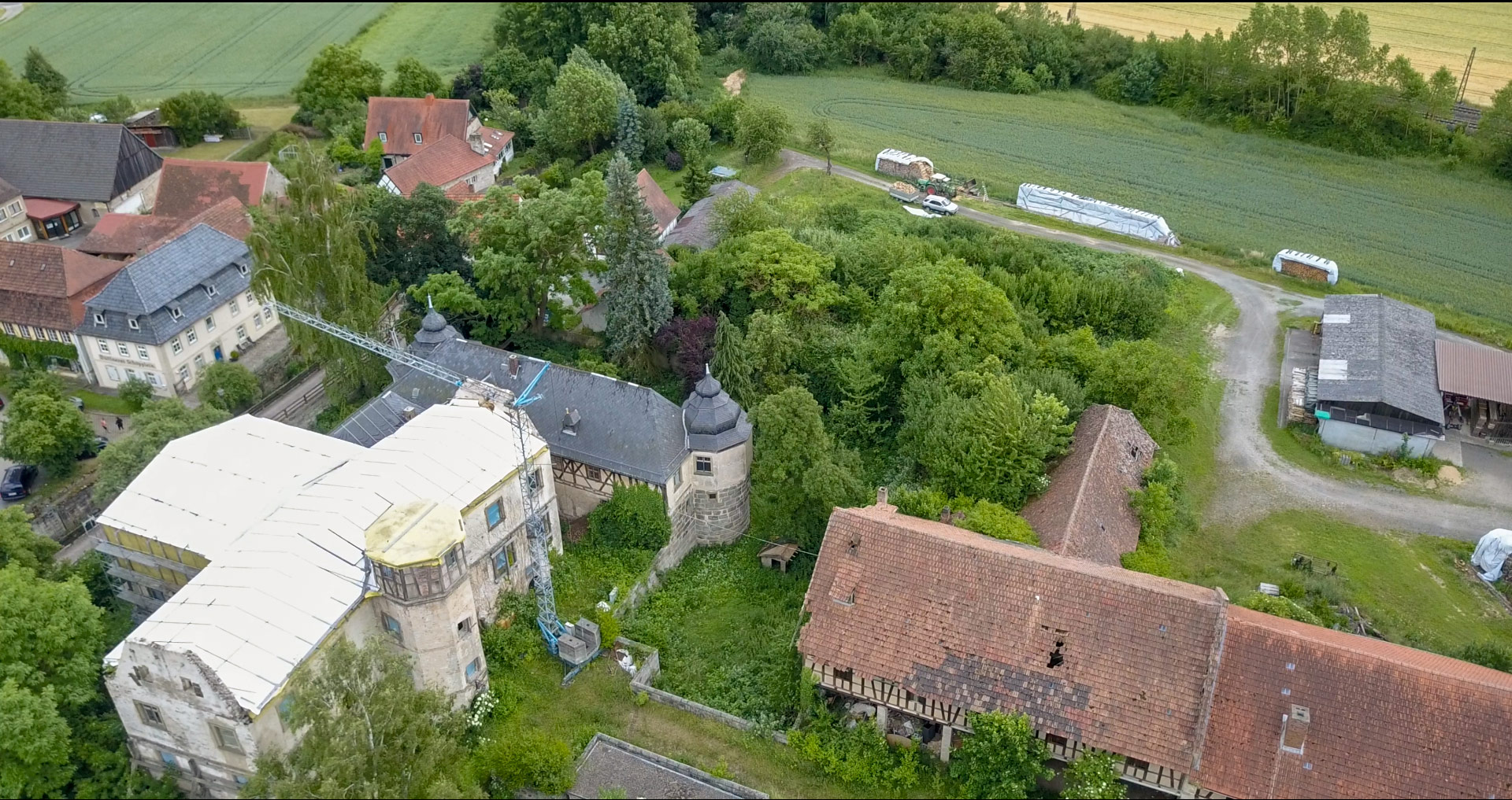 Blick von Nordwesten auf das Hauptgebäude des Rotenhan-Schlosses, hier mit wegen Brandschäden abgedecktem Dach.